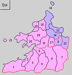 後の福岡県糸島郡域の町村制時点の町村。